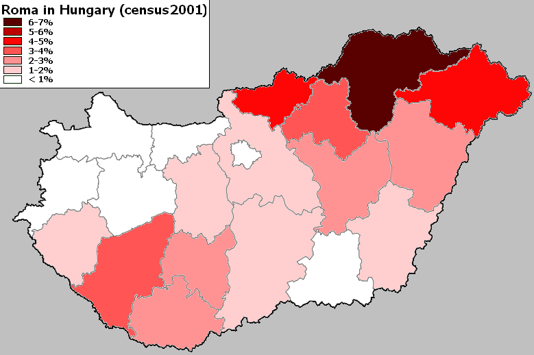 Roma minority in Hungary